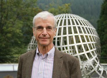 Foto di Harald Niederreiter